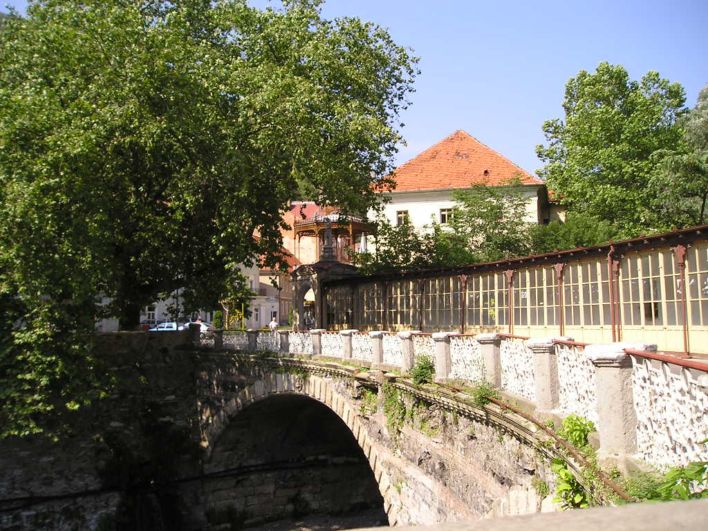 Podul de piatră peste Cerna, cu galeria acoperită